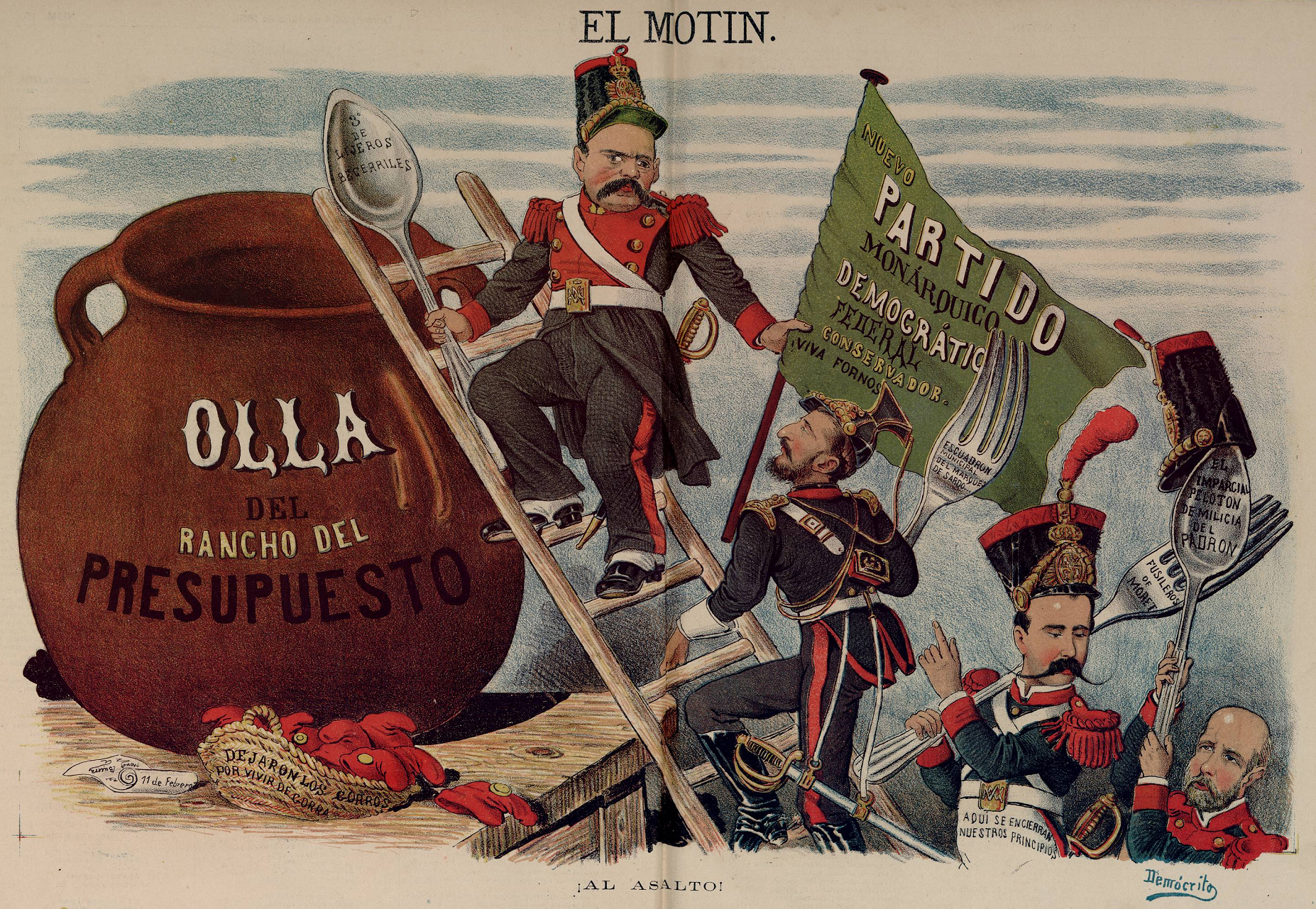 Al asalto, de Eduardo Sojo «Demócrito», publicada en la revista satírica española El Motín.